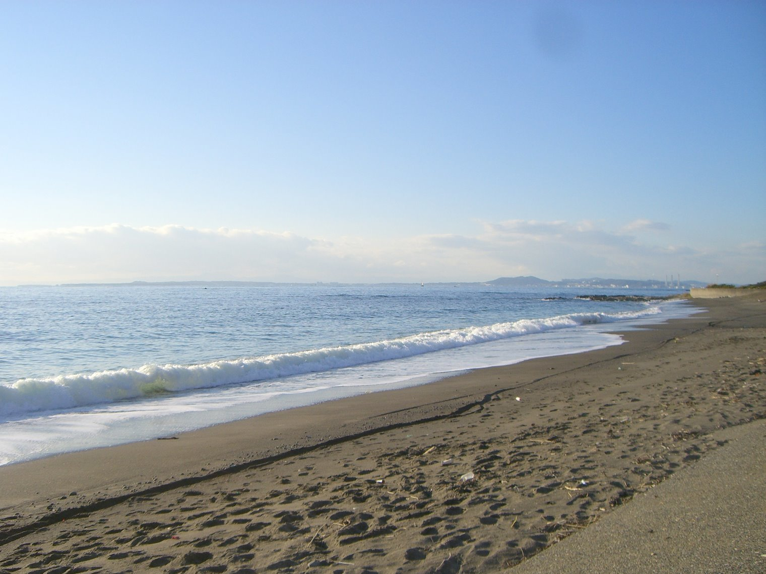 [千葉県]保田海岸にて。もうすぐ満潮。